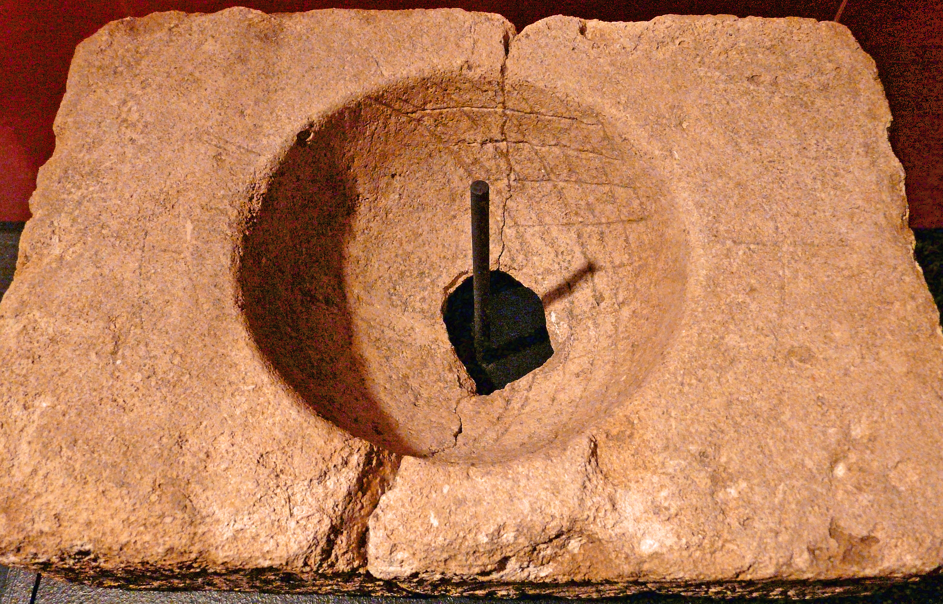 Sonnenuhr, Kalkstein, 1. Jh.; Clemens-Sels-Museum, Neuss